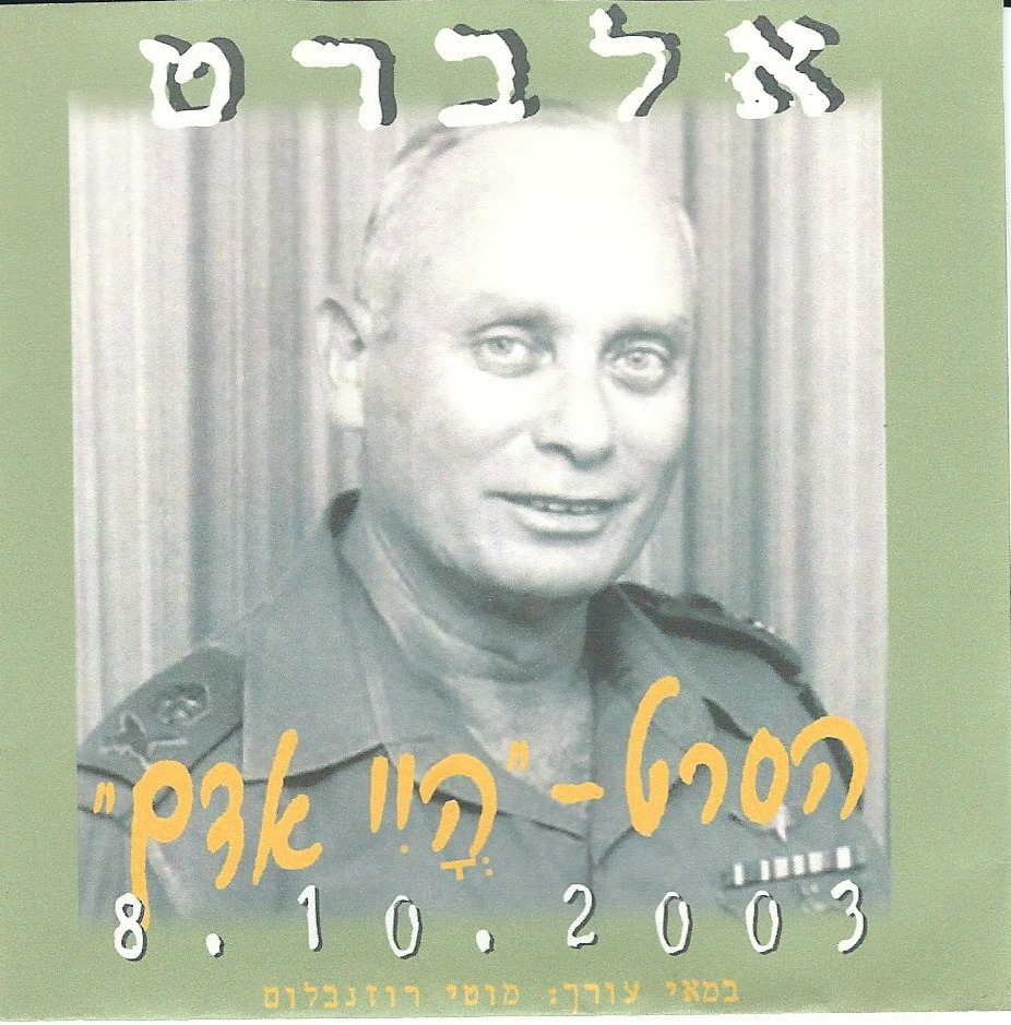 סיפור חייו ומותו של האלוף אלברט מנדלר